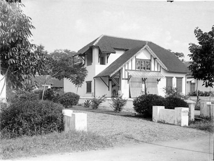 Negatief. Een door de heer Berkhoven gebouwd huis, met halfsteensmuren en zonder zijgalerijen, in het villapark tusschen de Genielaan en Karang-tengah te Semarang, Java